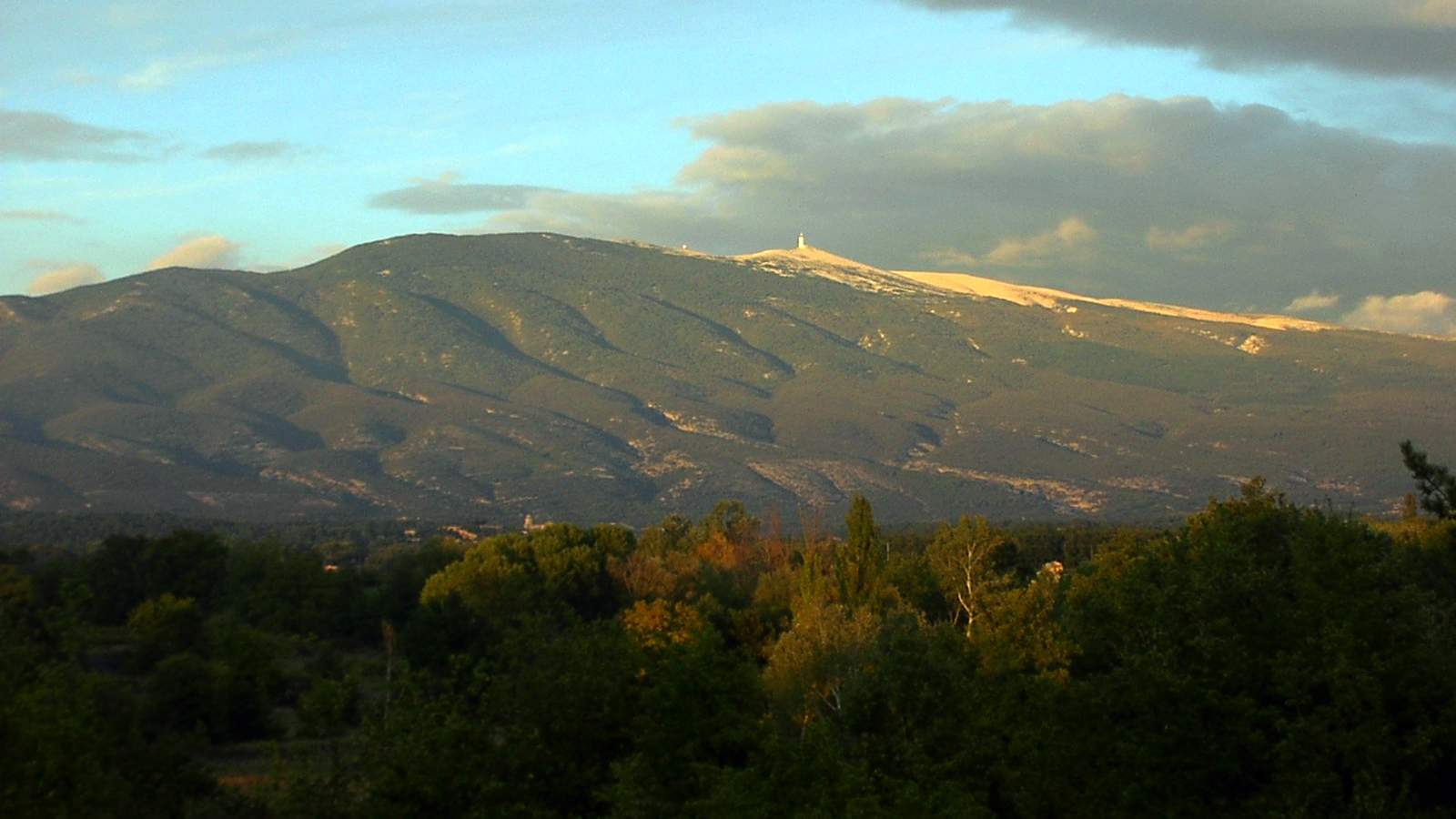 Der Mont Ventoux in der herbstlichen Abendsonne, von Südwesten gesehen.